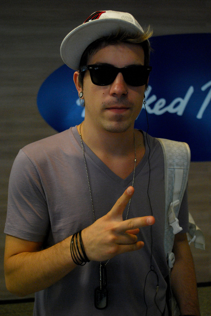 Diego Ferrero dos Nx Zero no Aeroporto de Congonhas, São Paulo.